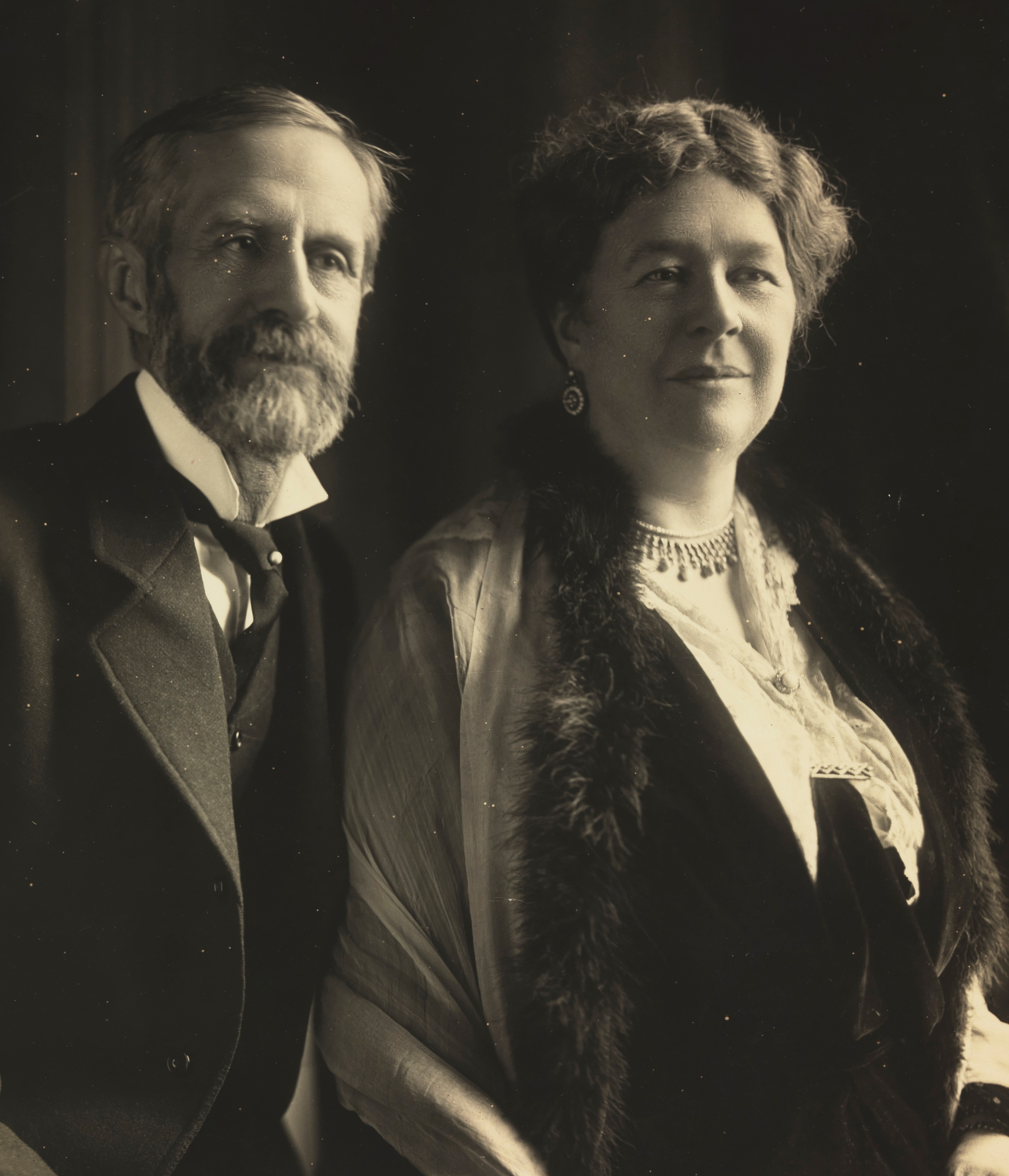 John Campbell Gordon Aberdeen & Temair, første Marki of Aberdeen & Temair, med sin kone Ishbel Markise of Aberdeen & Temair. - Med dedikasjon. Depicted person: Aberdeen & Temair, Marki of, John Campbell Gordon (1847-1934) Depicted person: Aberdeen & Temair, Markise of , Ishbel (1857-1939) Depicted place: Storbritannia